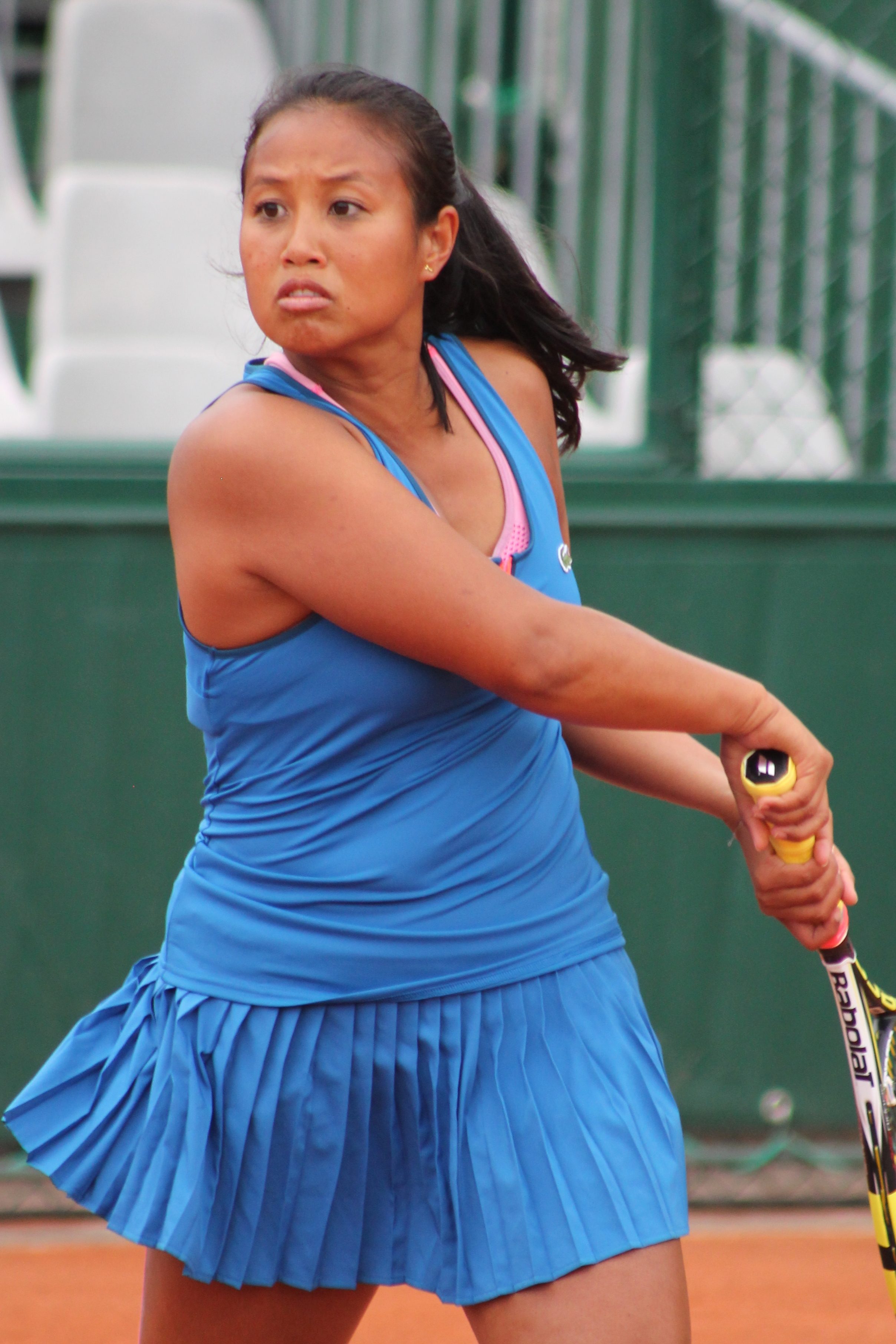 Ramialison RG15 (11)